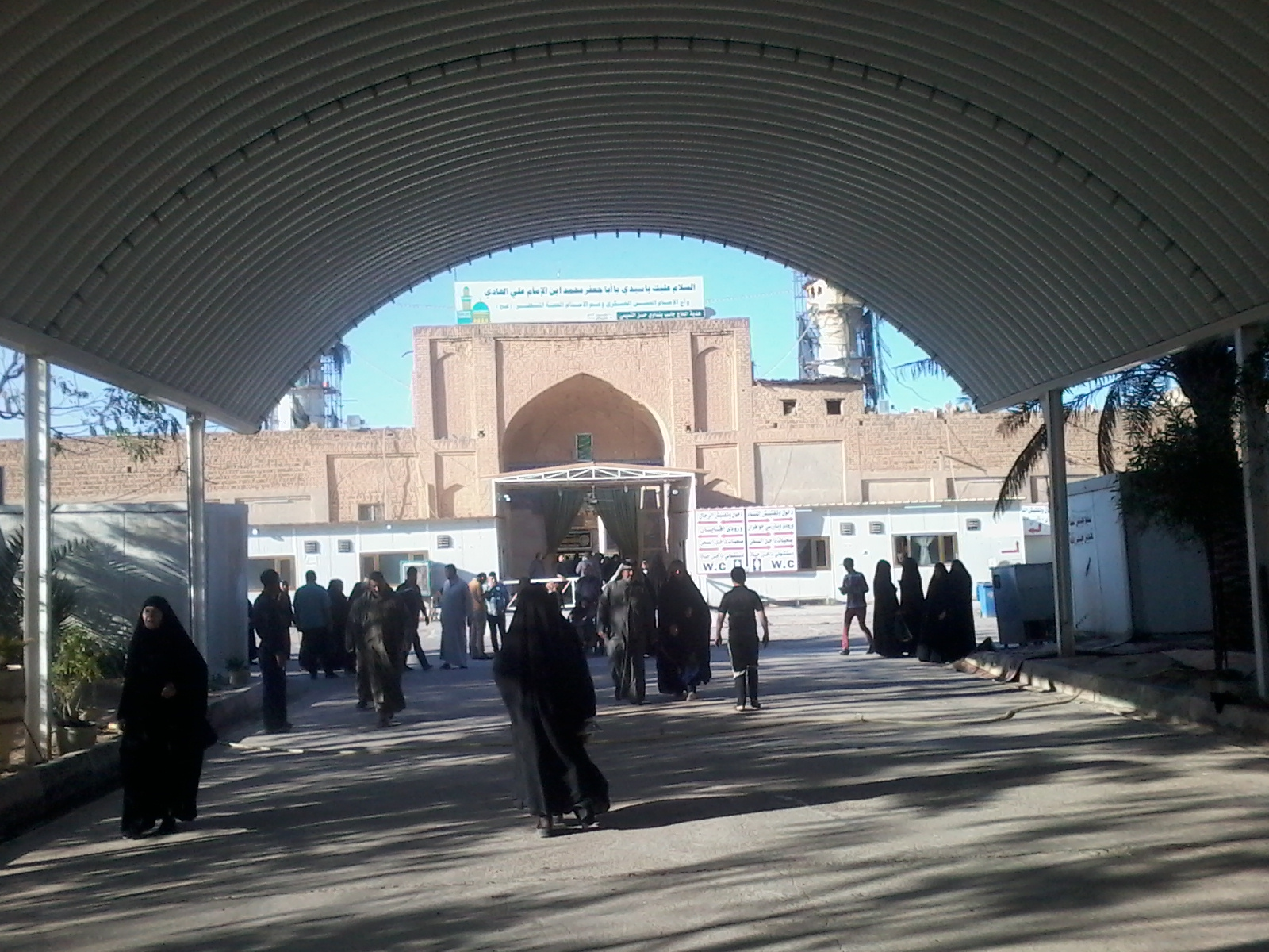 العربية مرقد السيد محمد "سبع الدجيل" في قضاء بلد